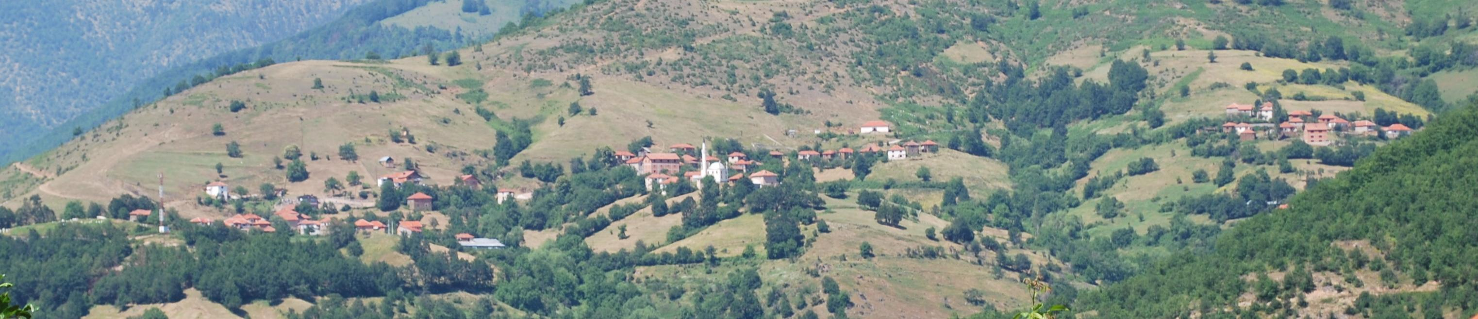 Strajane, Gostivar